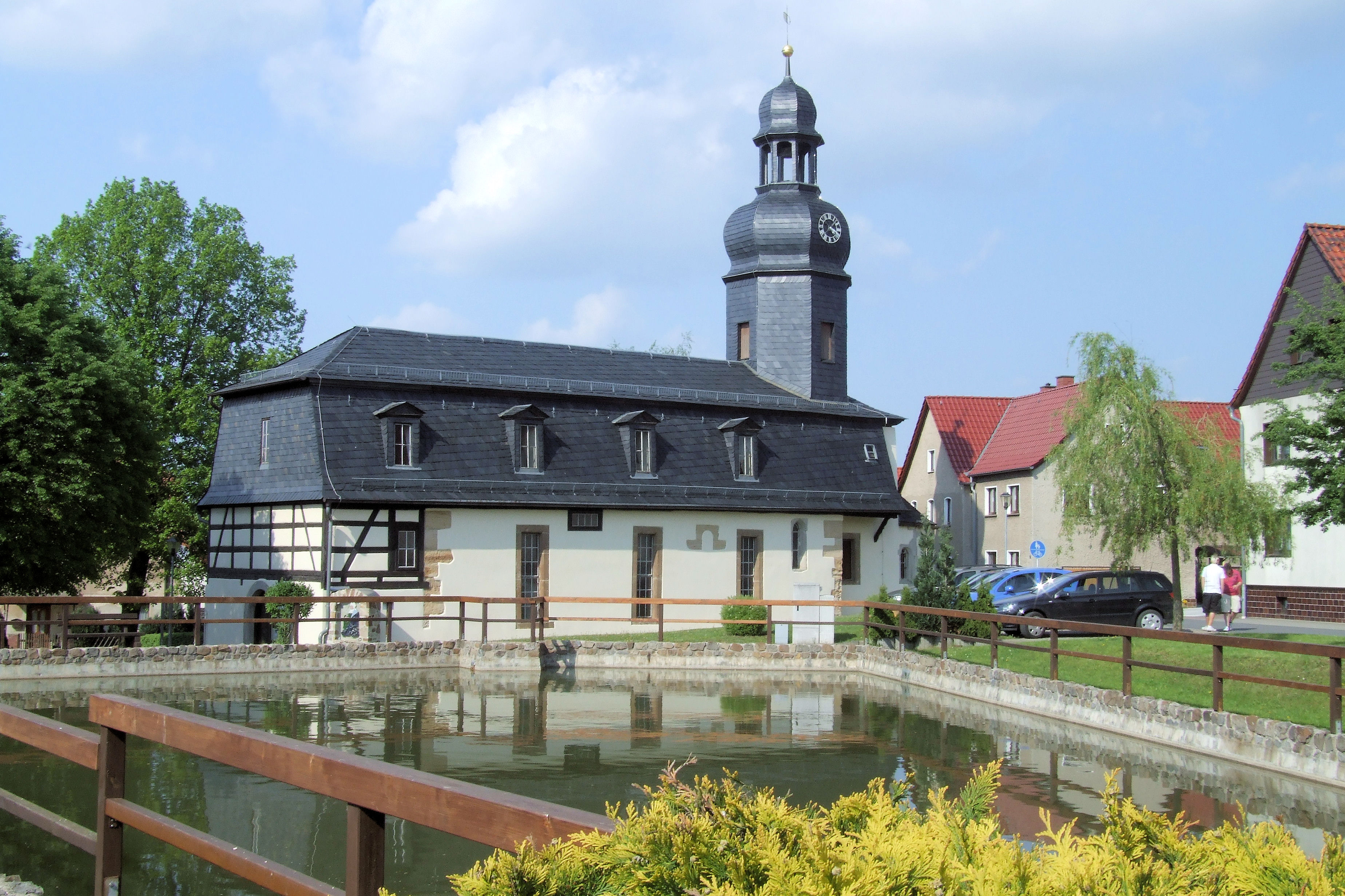 Kirche Bucha